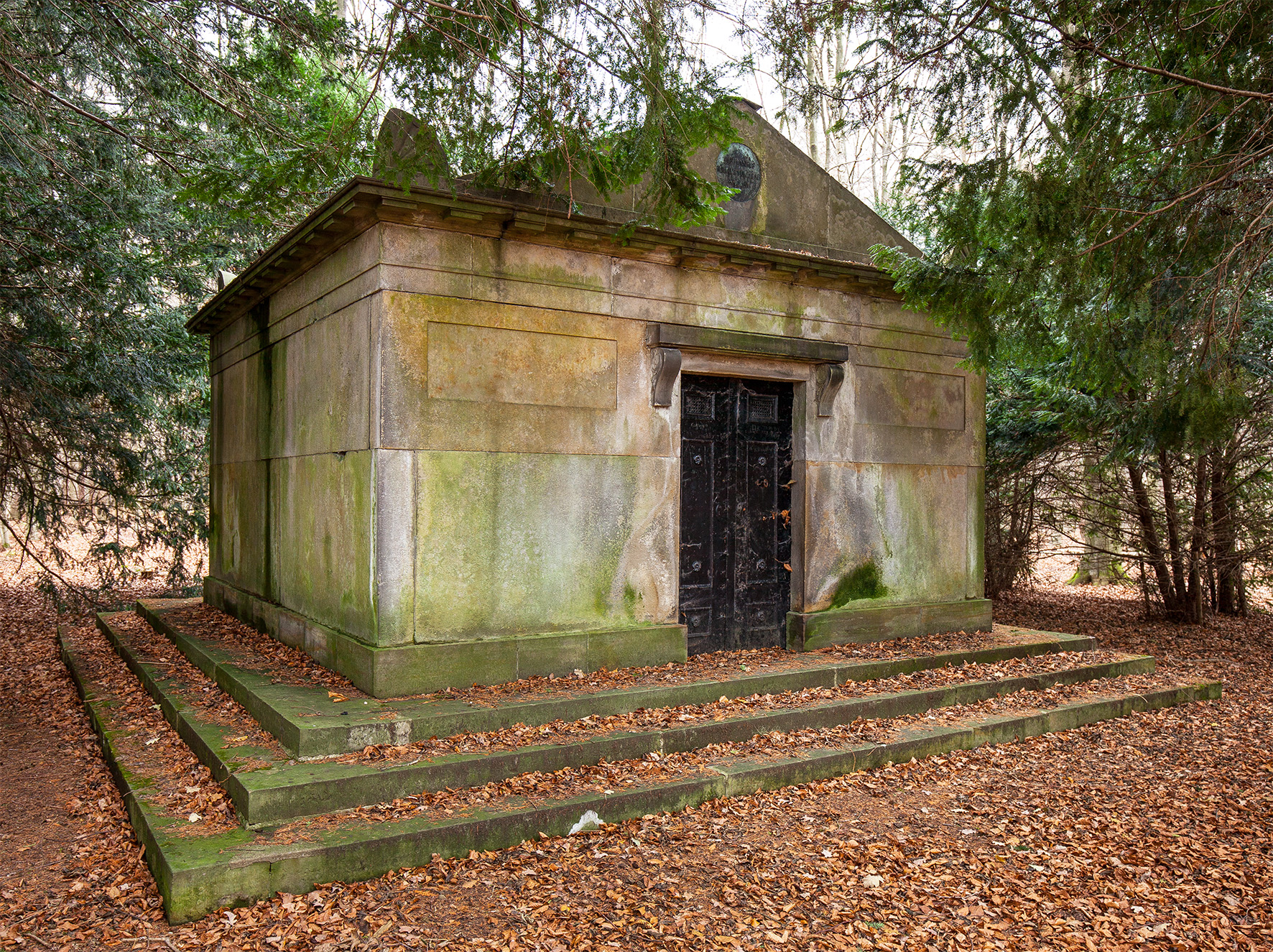 Mausoleum von Gräfin Juliane von Schaumburg-Lippe und ihrer Mutter Gräfin Ulrike Eleonore von Hessen-Philippsthal-Barchfeld im Schaumburger Wald.